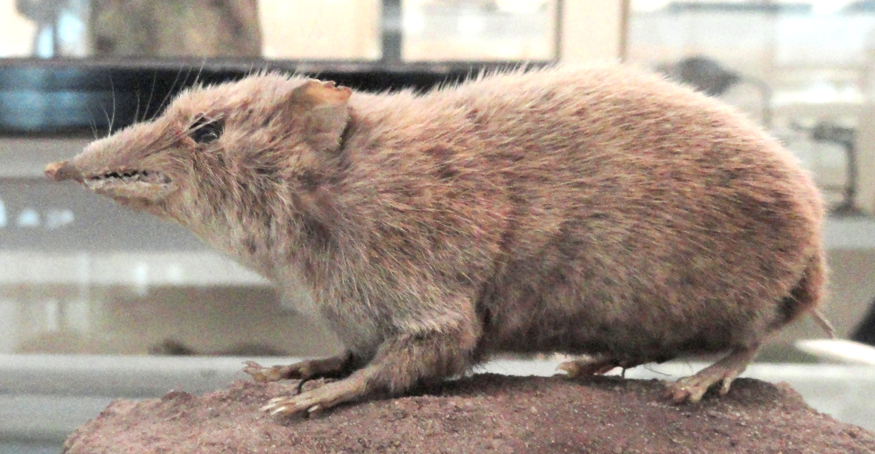 Exhibit in Naturmuseum Senckenberg, Frankfurt am Main, Germany.